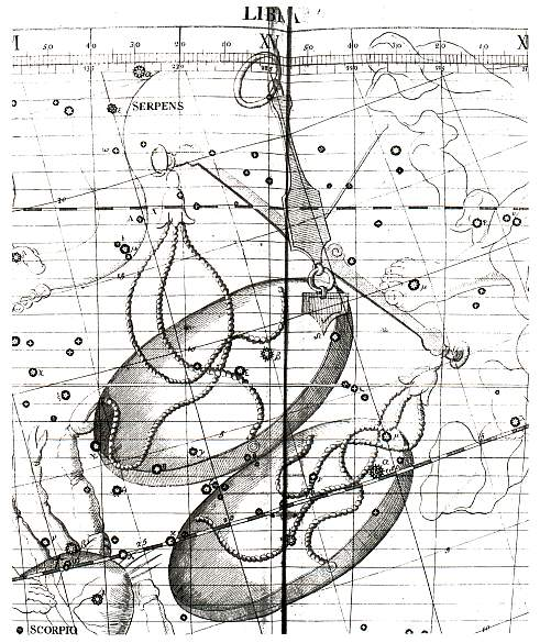 Libra